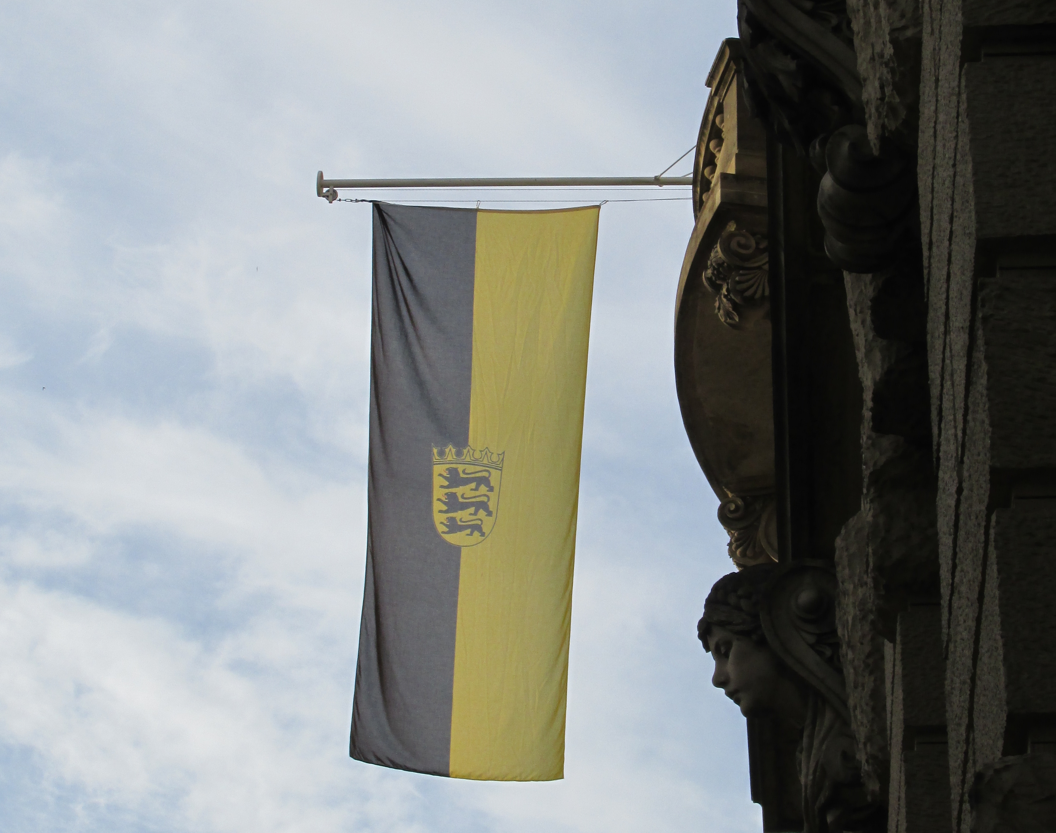 Baden-Württemberg-Flagge